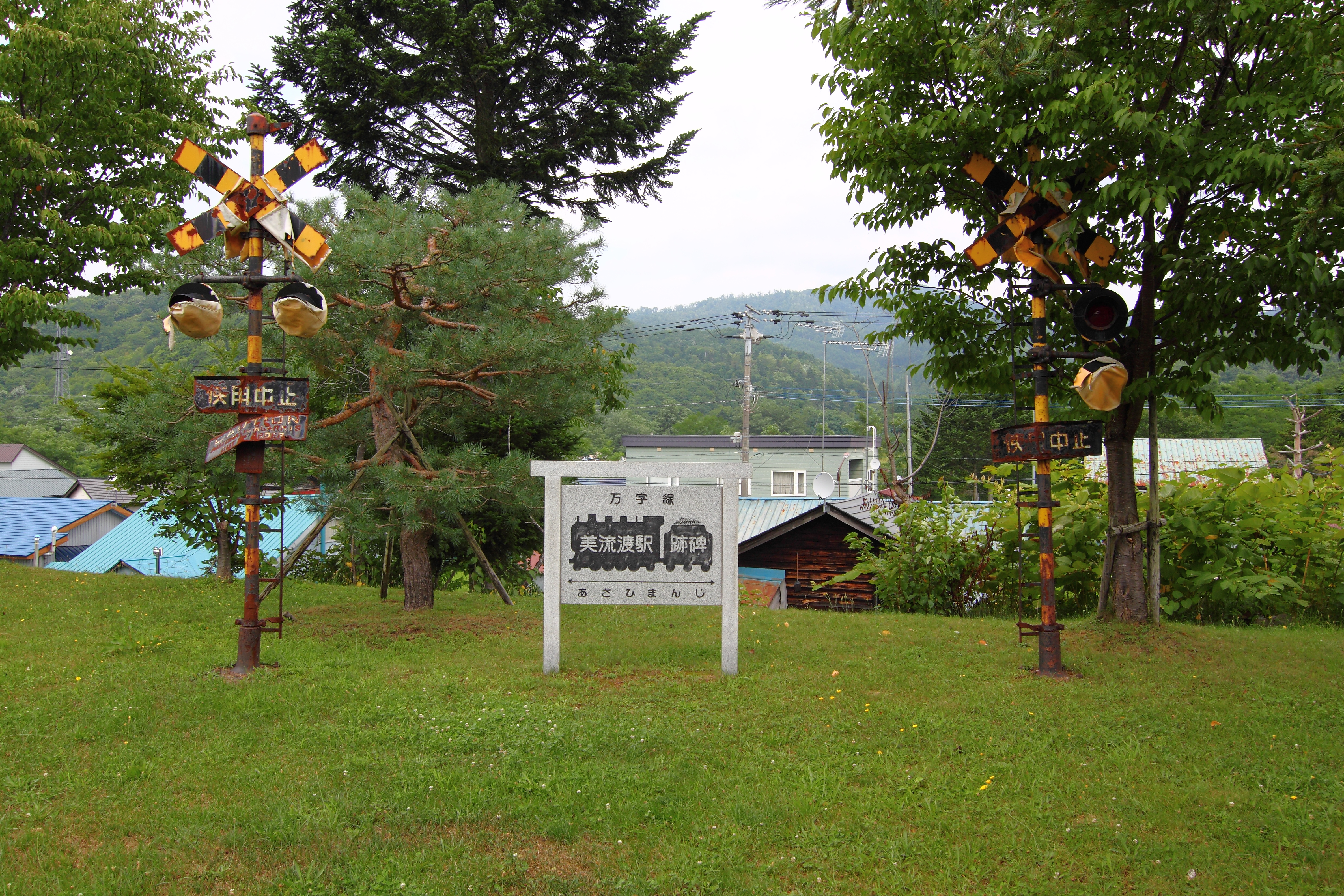 万字線美流渡駅跡にある駅碑。